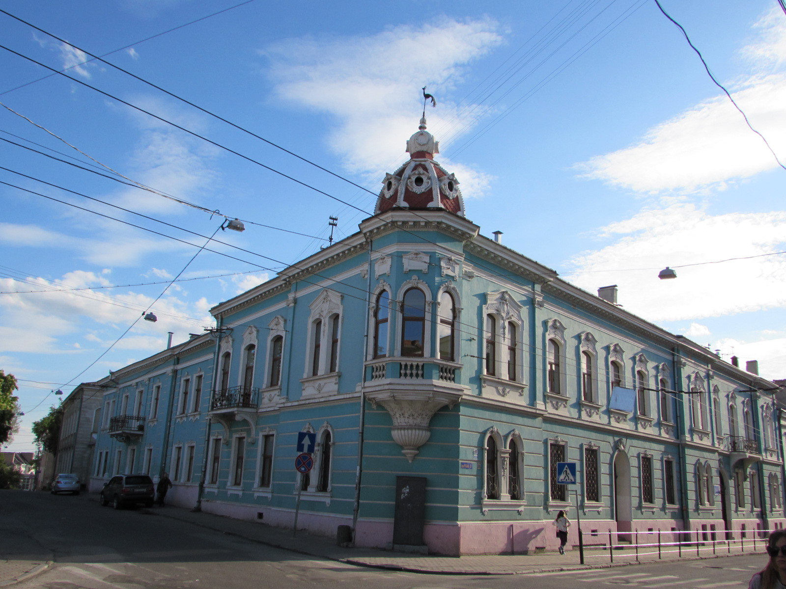 Житловий будинок (мур.), Тернопіль, вул. Руська, 36